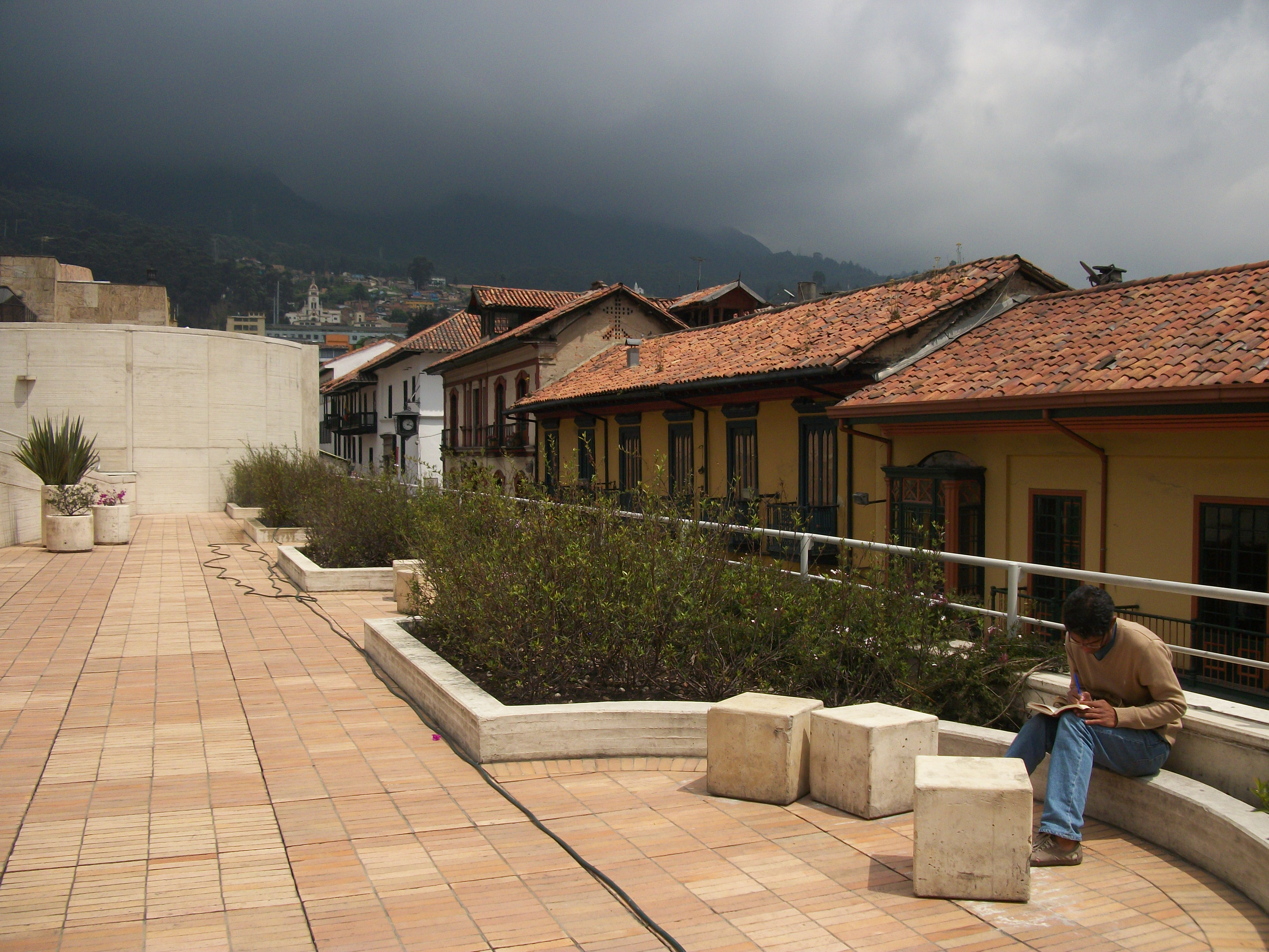 Cerros de Bogotá desde el Centro Cultural Gabriel García Márquez, calle Décima. Al fondo, iglesia del barrio Egipto.